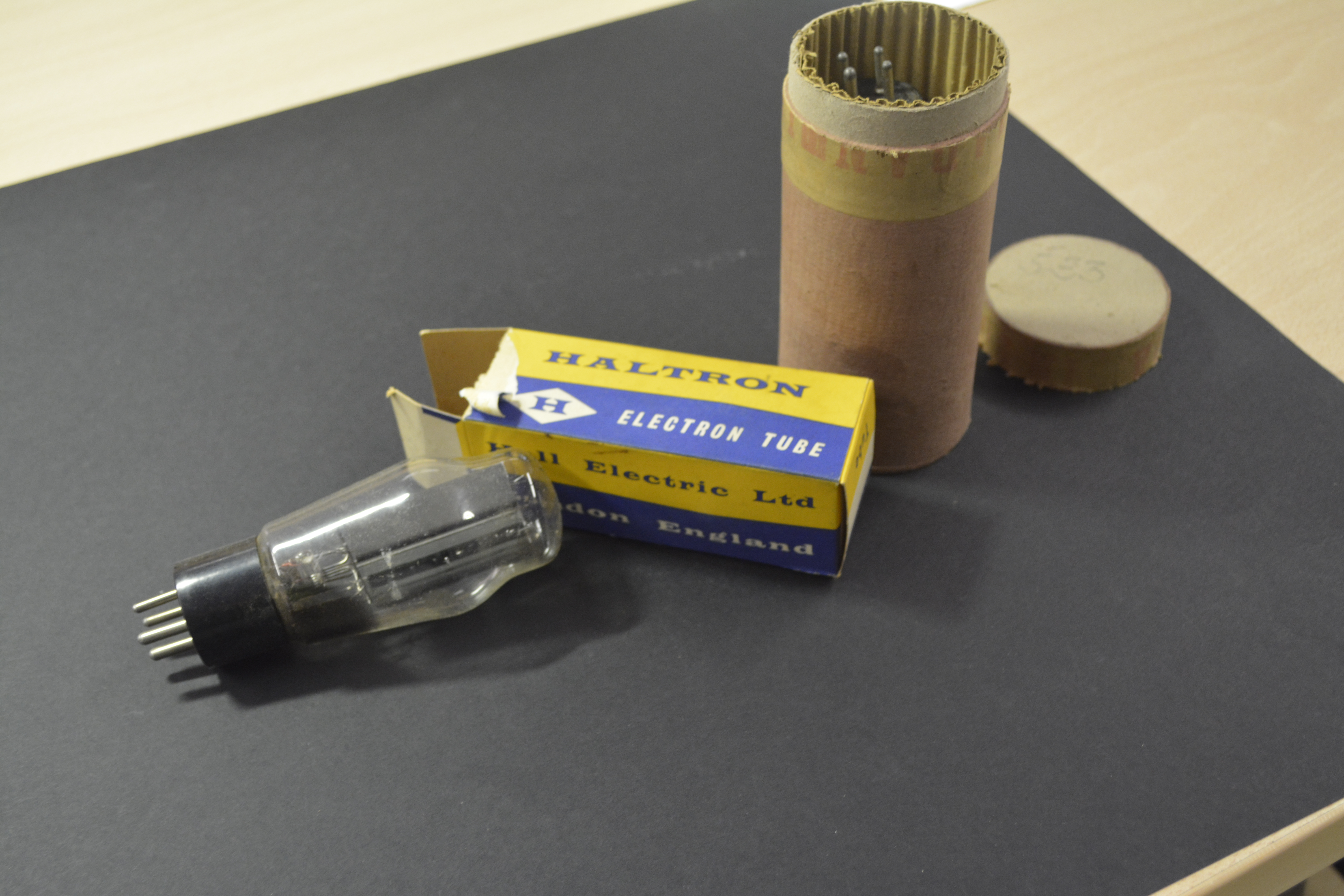 Imatge d'una bombeta d'un projector del cinema Victòria (fons Círculo Mercantil - Arxiu Municipal de Palafrugell)